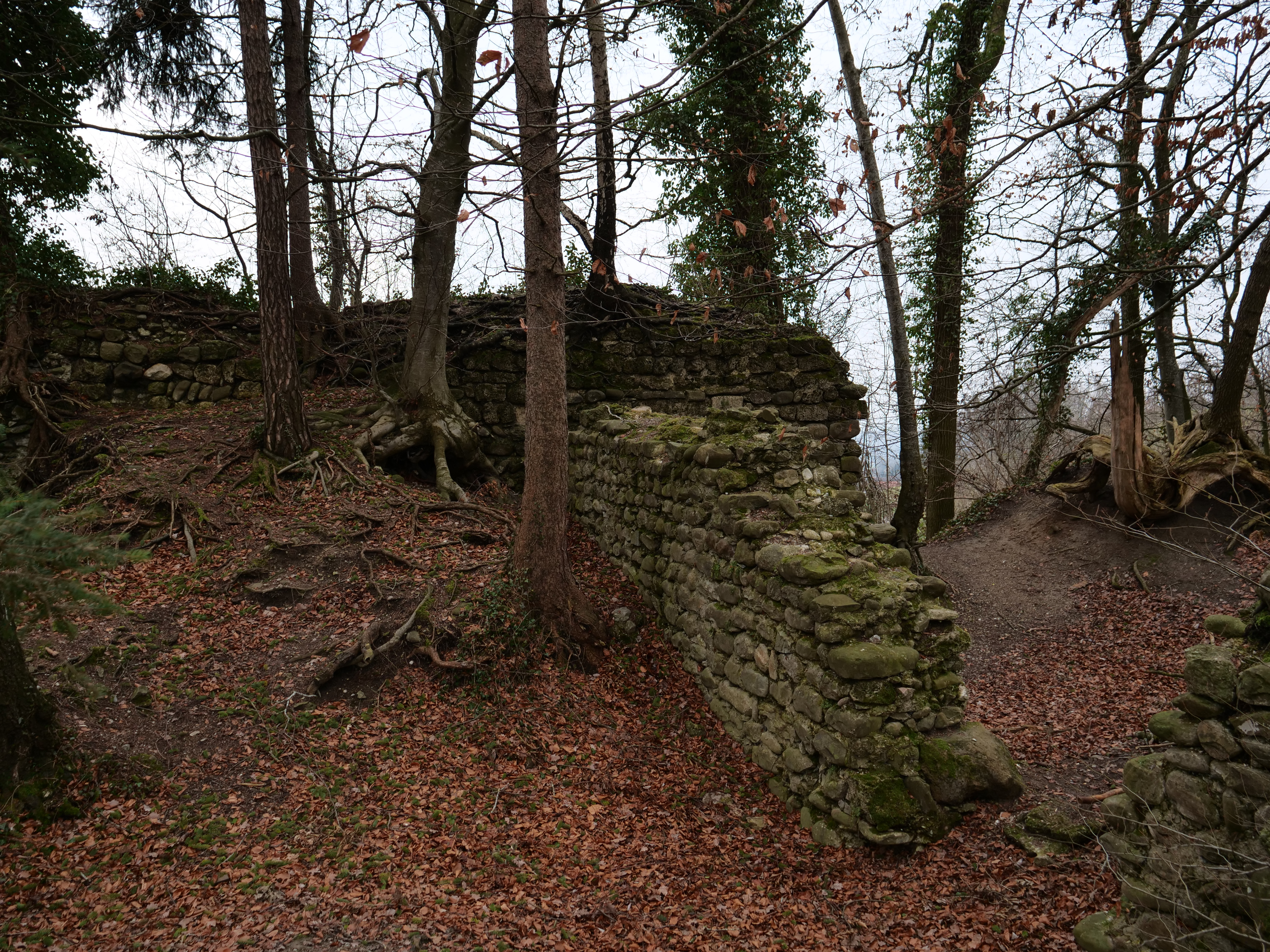 Burgruine Heuberg